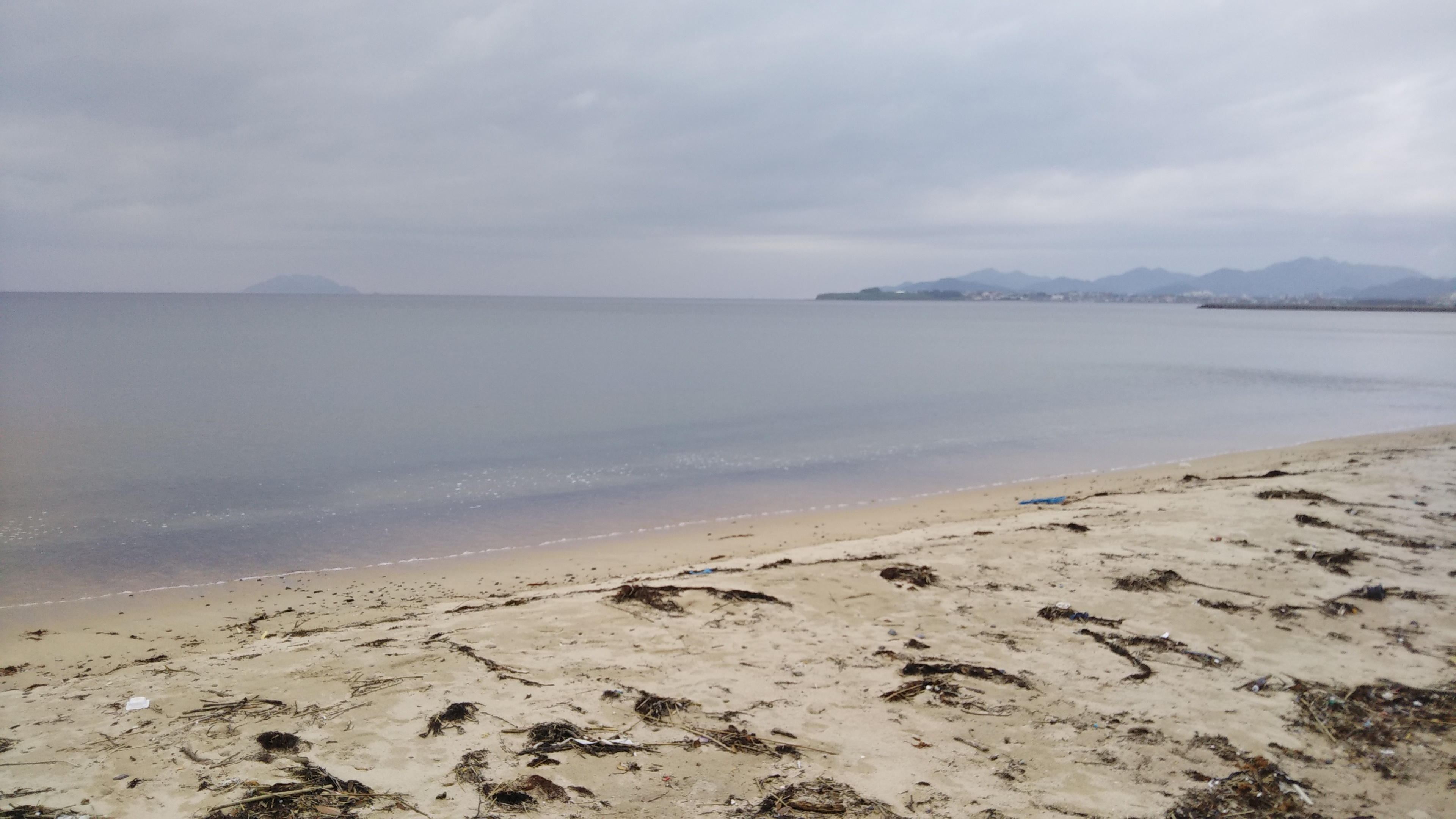 山口県下関市の綾羅木海岸と左奥にうっすらと見える蓋井島。